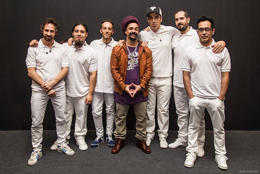 Martín Gariglio, Walter Aguirre, Diego Gonzalez, Mariano Castro, Matias Zapata, Lucas Colamusi, Alejandro Ramos